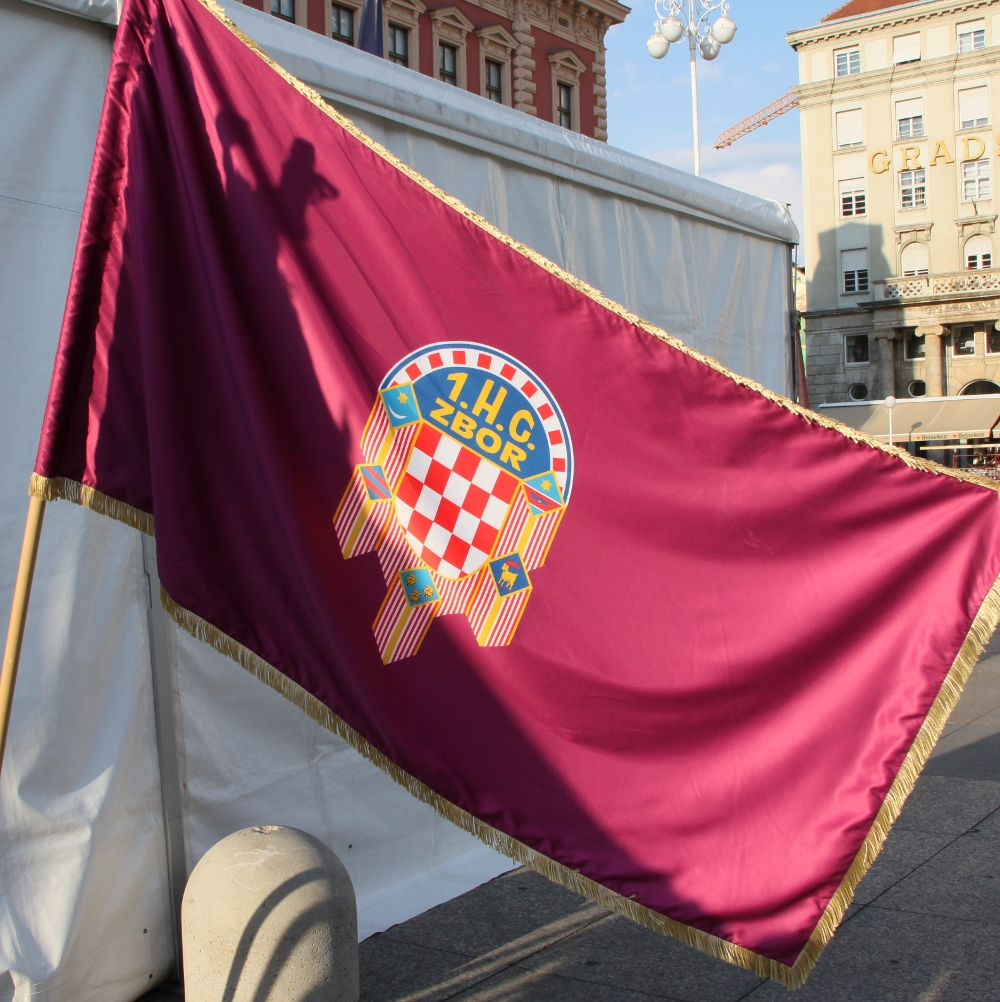 Ceremonijalni program u sklopu obilježavanja 20. obljetnice formiranja Oružanih snaga Republike Hrvatske, Dana Oružanih snaga i Dana Hrvatske kopnene vojske. Hodni program ešalona ratnih zastava, nastup Orkestra OSRH i počasno ceremonijalni program Počasno zaštitne bojne